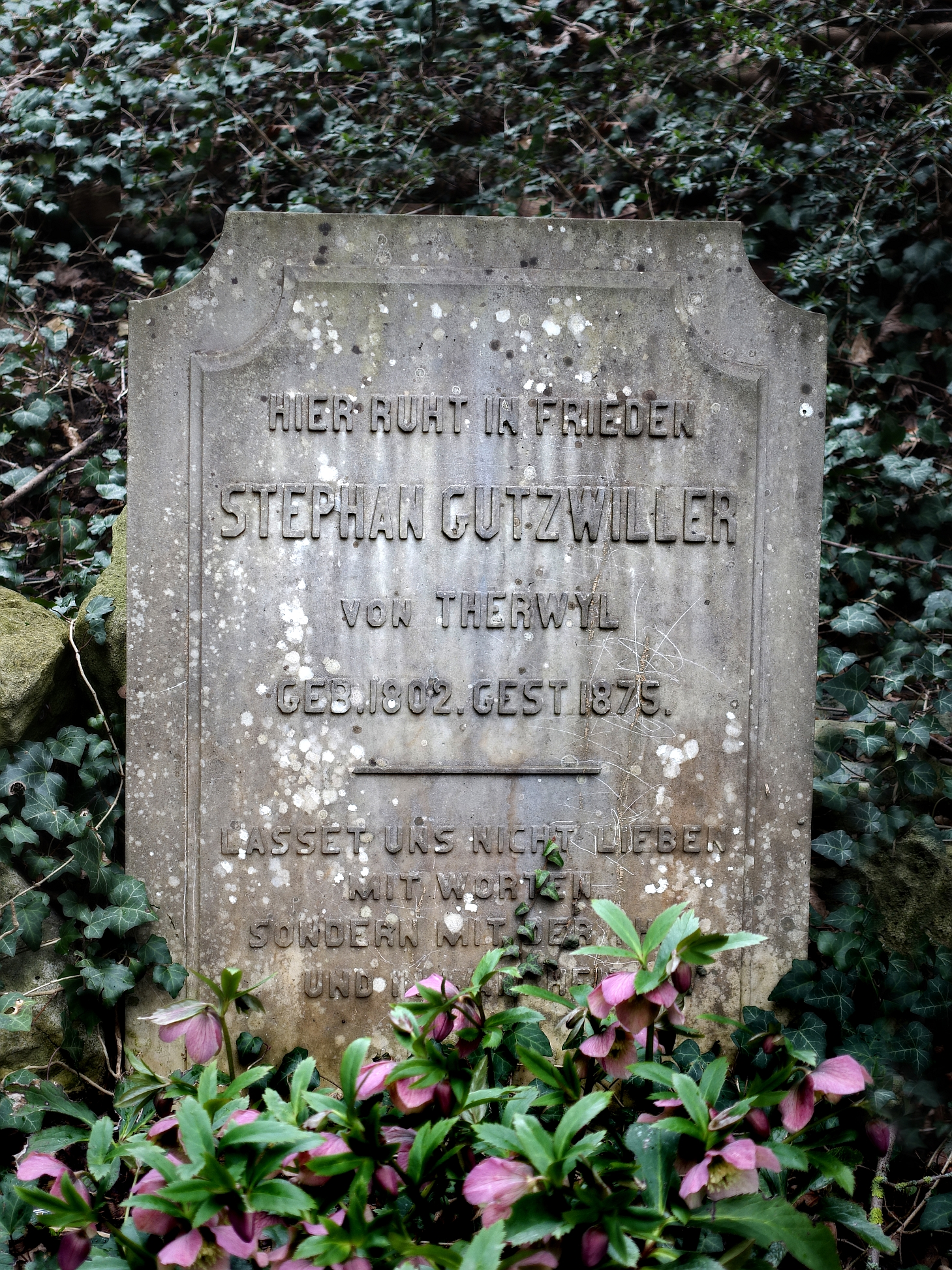 Stephan Gutzwiller von Therwil (1802–1875) Hauptführer der Baselbieter Revolution. Grab auf dem Friedhof Liestal. Standort: Feld LP gegen Basel Stadt. 3. August 1833 in der Schlacht an der Hülftenschanz. Grabinschrift: Lasset uns nicht lieben mit Worten, sondern mit der That und in Wahrheit. 1. Johannes 3.18